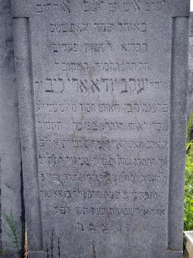 מציבה של הרה"ק רבי יהודה אריה ליב פרענקיל זצוק"ל